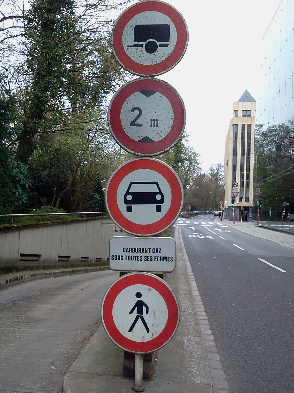 Verkéiersschëlter aus dem Lëtzebuerger Code de la route.